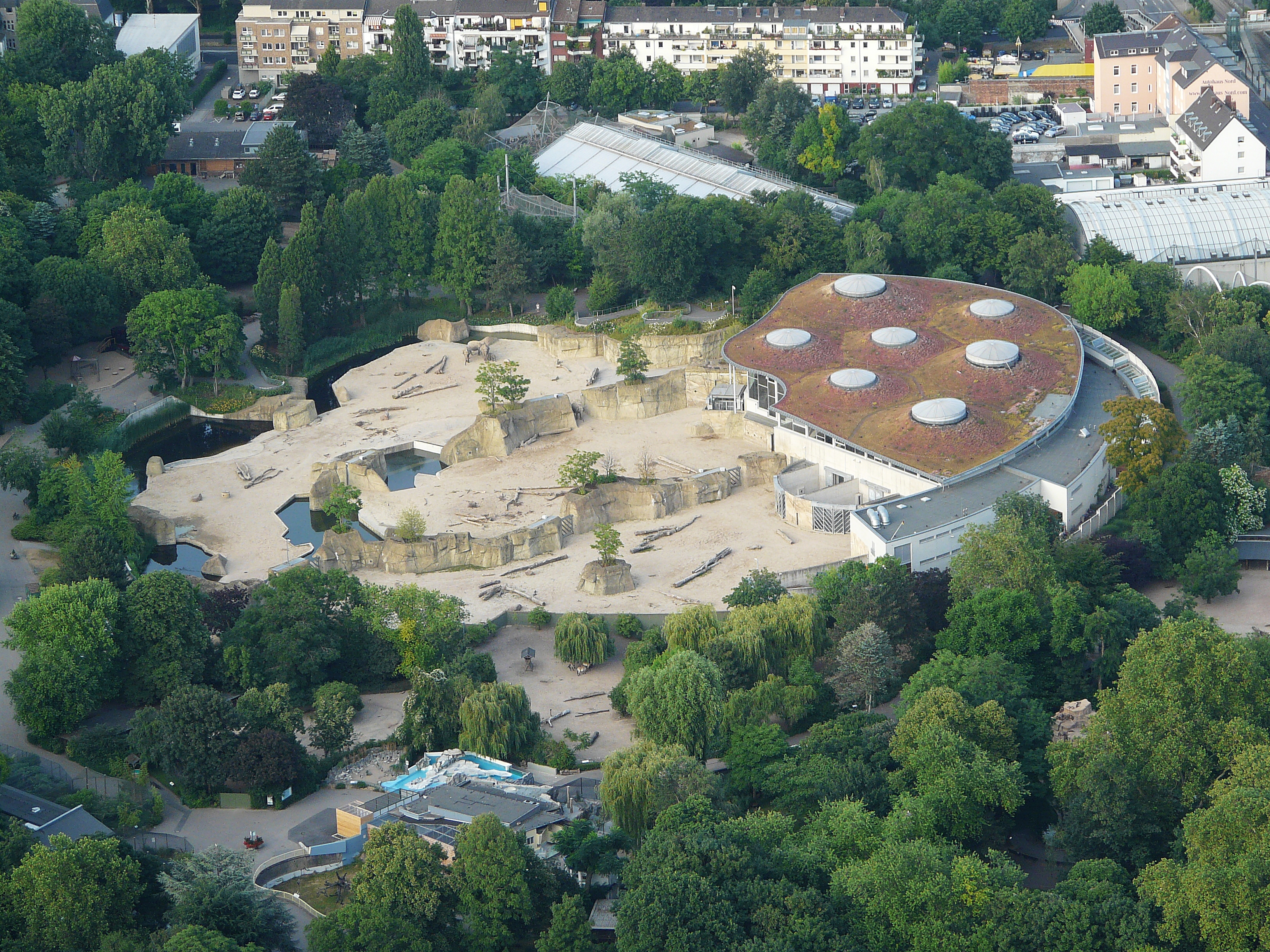 Das Elefantenhaus im Kölner Zoo